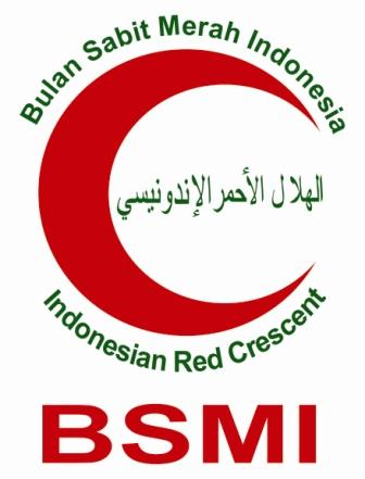 Lambang BSMI